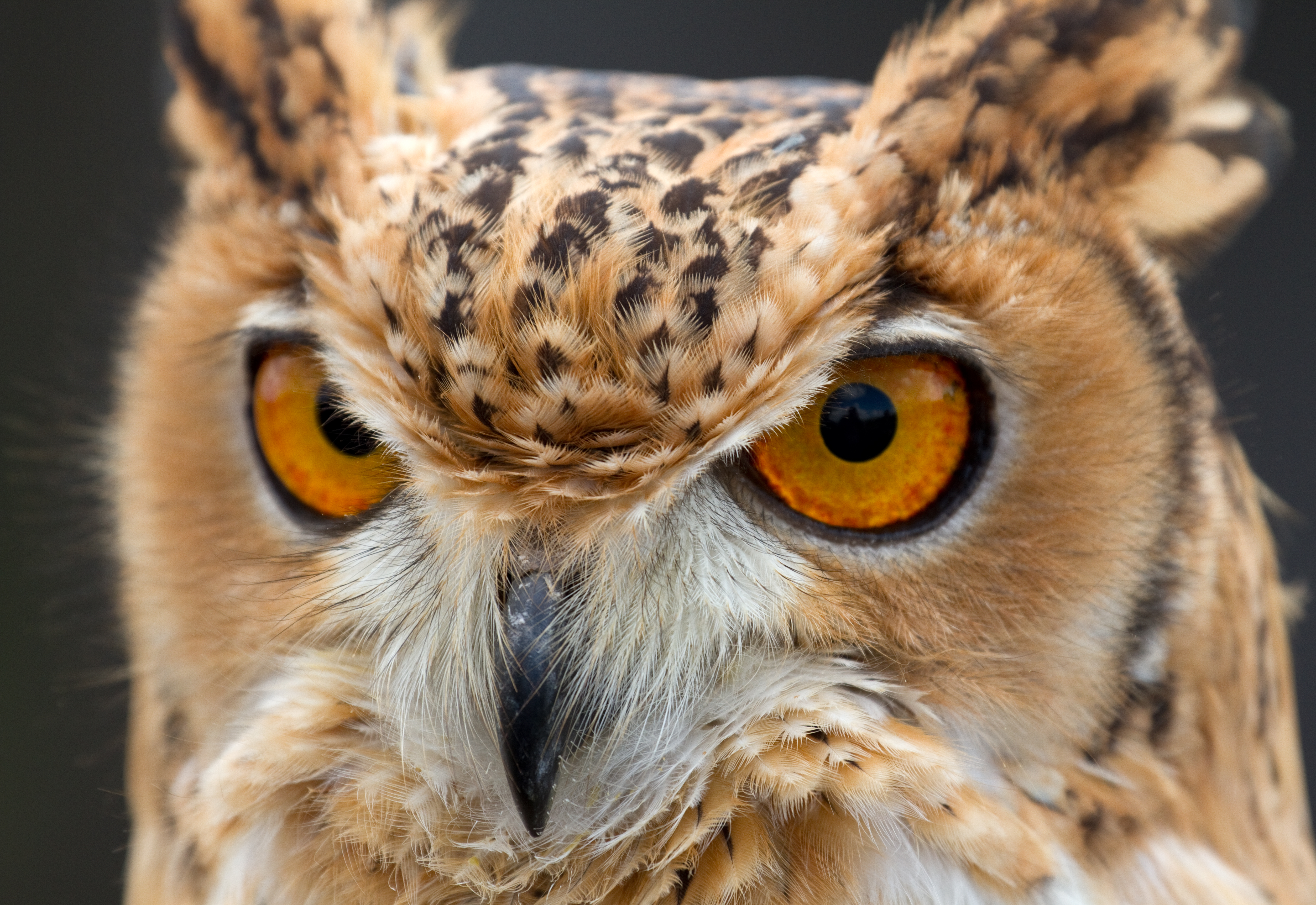 Owl 1